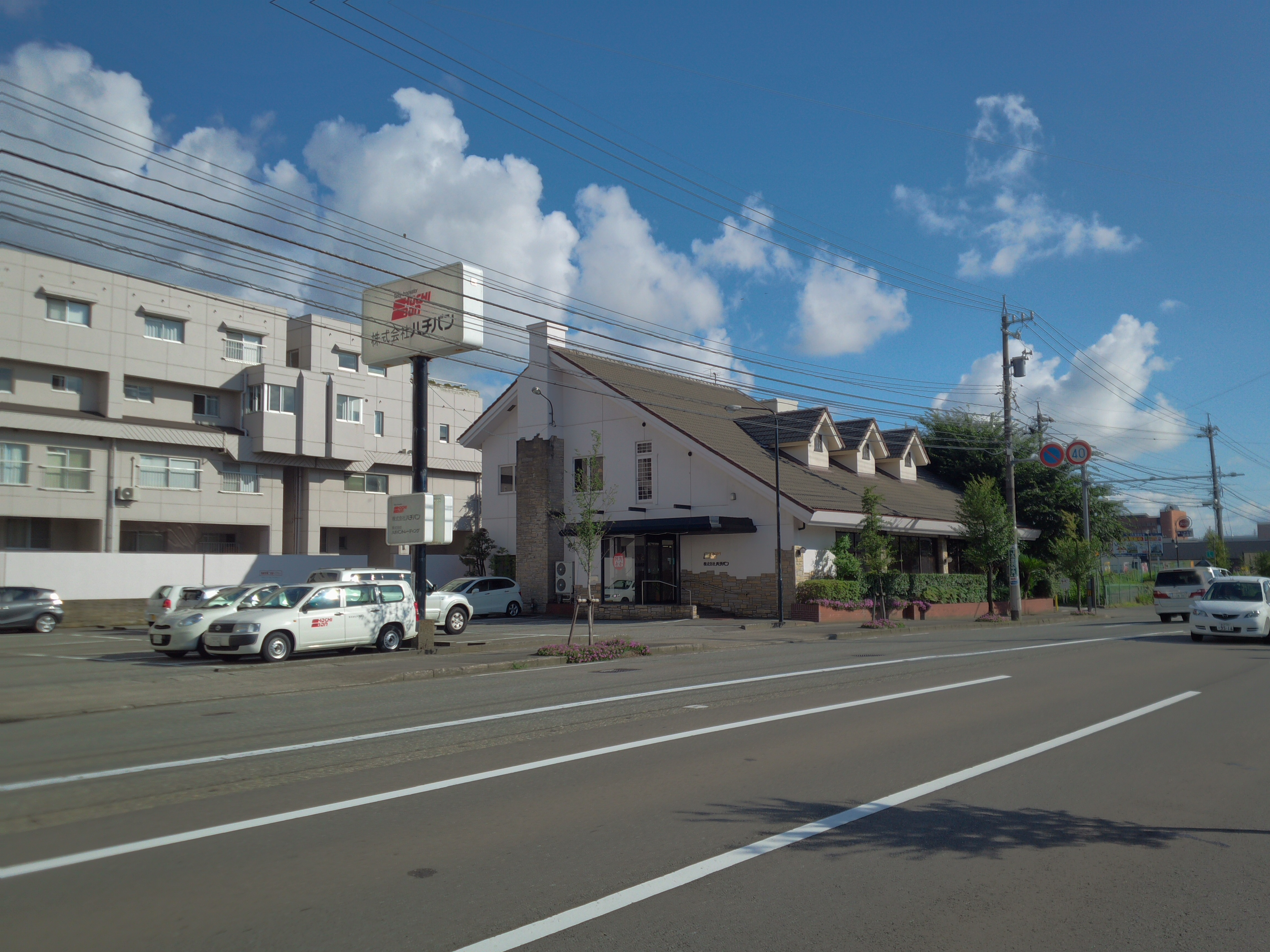 Hachiban HeadOffice